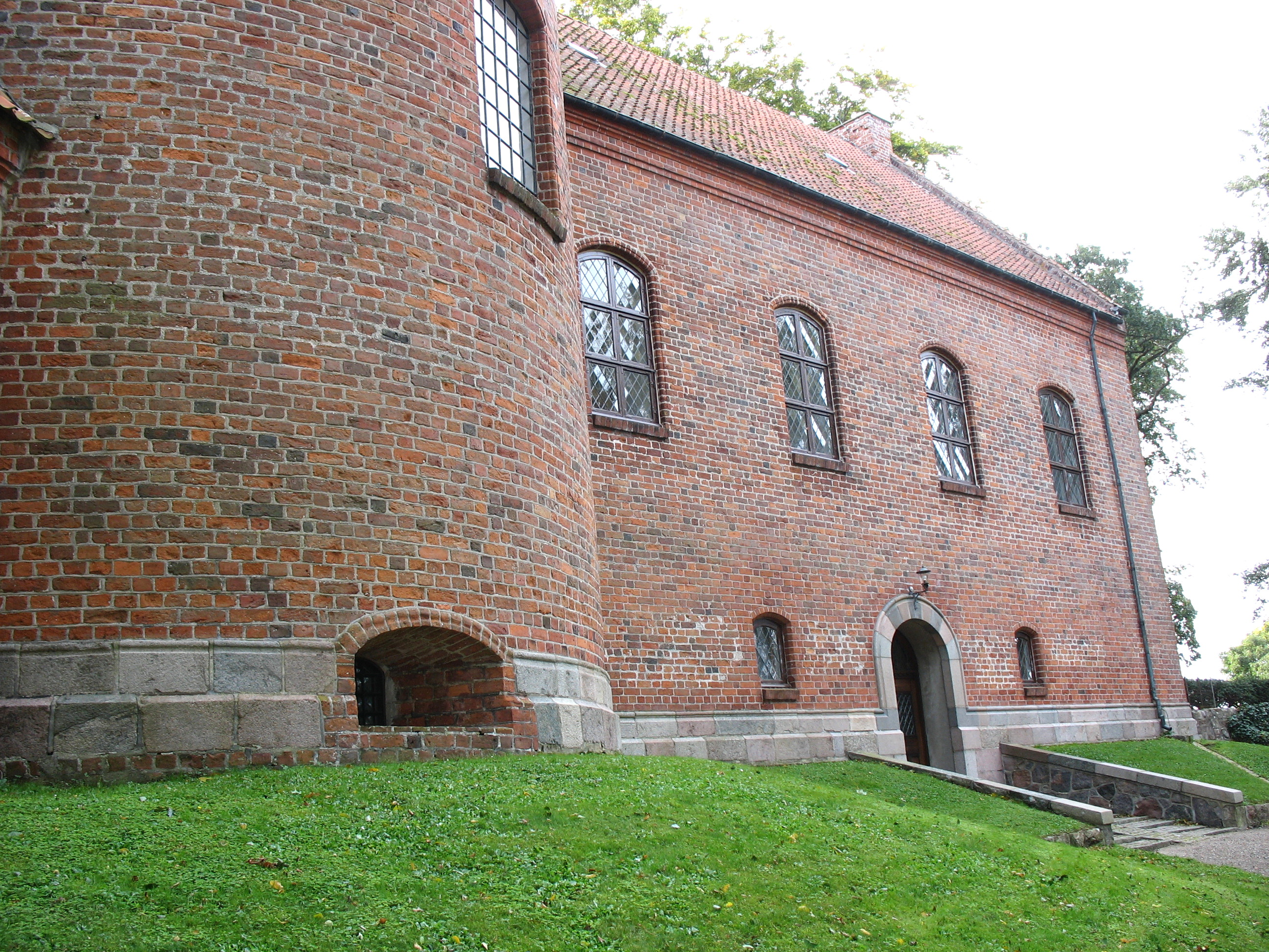 Fangekælderen fra slottet kan ses endnu.